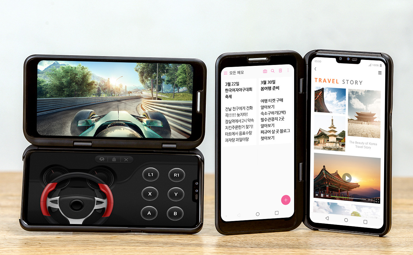 LG V50 ThinQ 출시